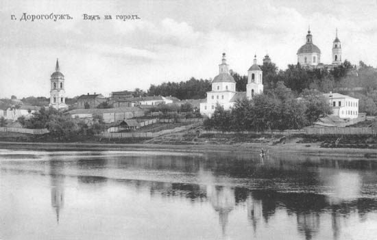 Дорогобуж. Вид в 1910-е годы